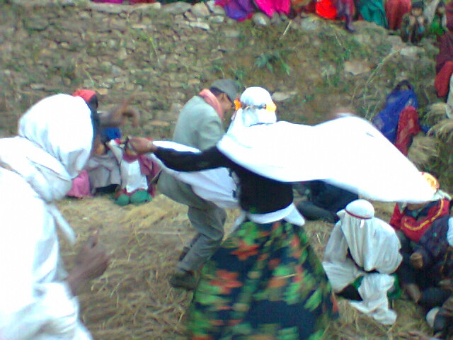 Maruni dance